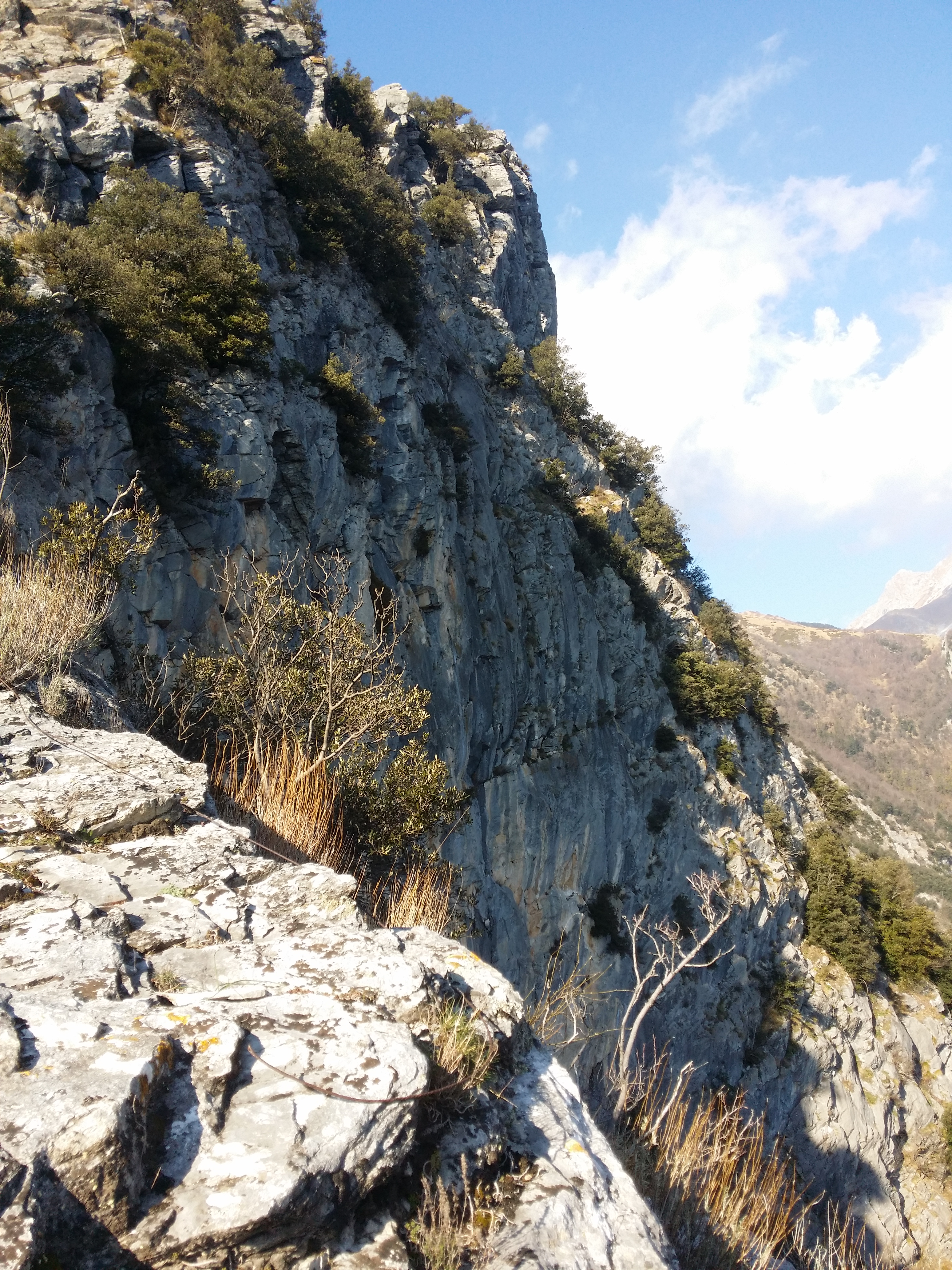 Possibile posizione del Colle Marcio, di cui parla Tito Livio, nei pressi di Retignano. La parete rocciosa è usata anche per le scalate.